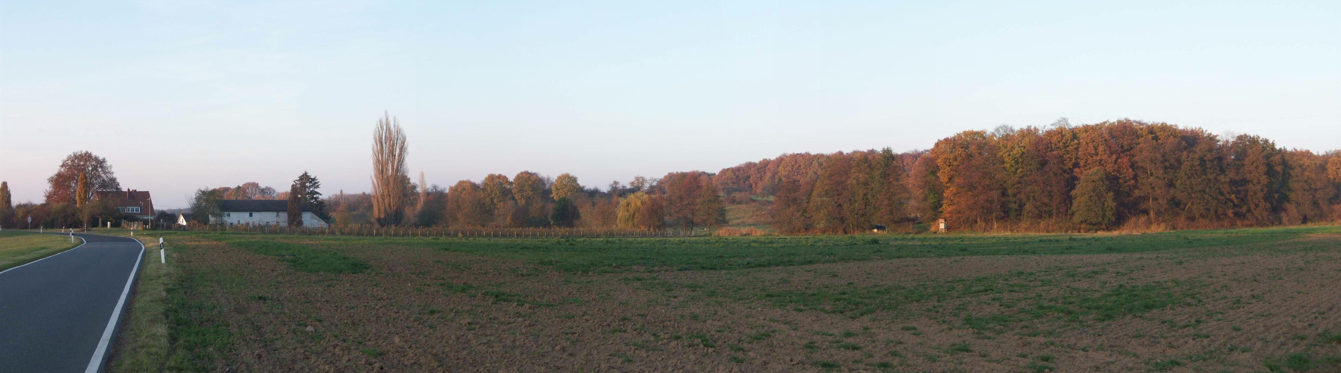 Blick auf das Tal des Schlierbachs vom Ort Schlierbach nach Langstadt. Links die Gebäude der Straßenmühle, rechts daneben eingezäunt, die Obstbäume des biologischen Anbaus. Mittig auf dem LSG Wingertsberg und rechts die Baumgruppe sind zwei der möglichen Lagen der ehemaligen Burg Schlierbach